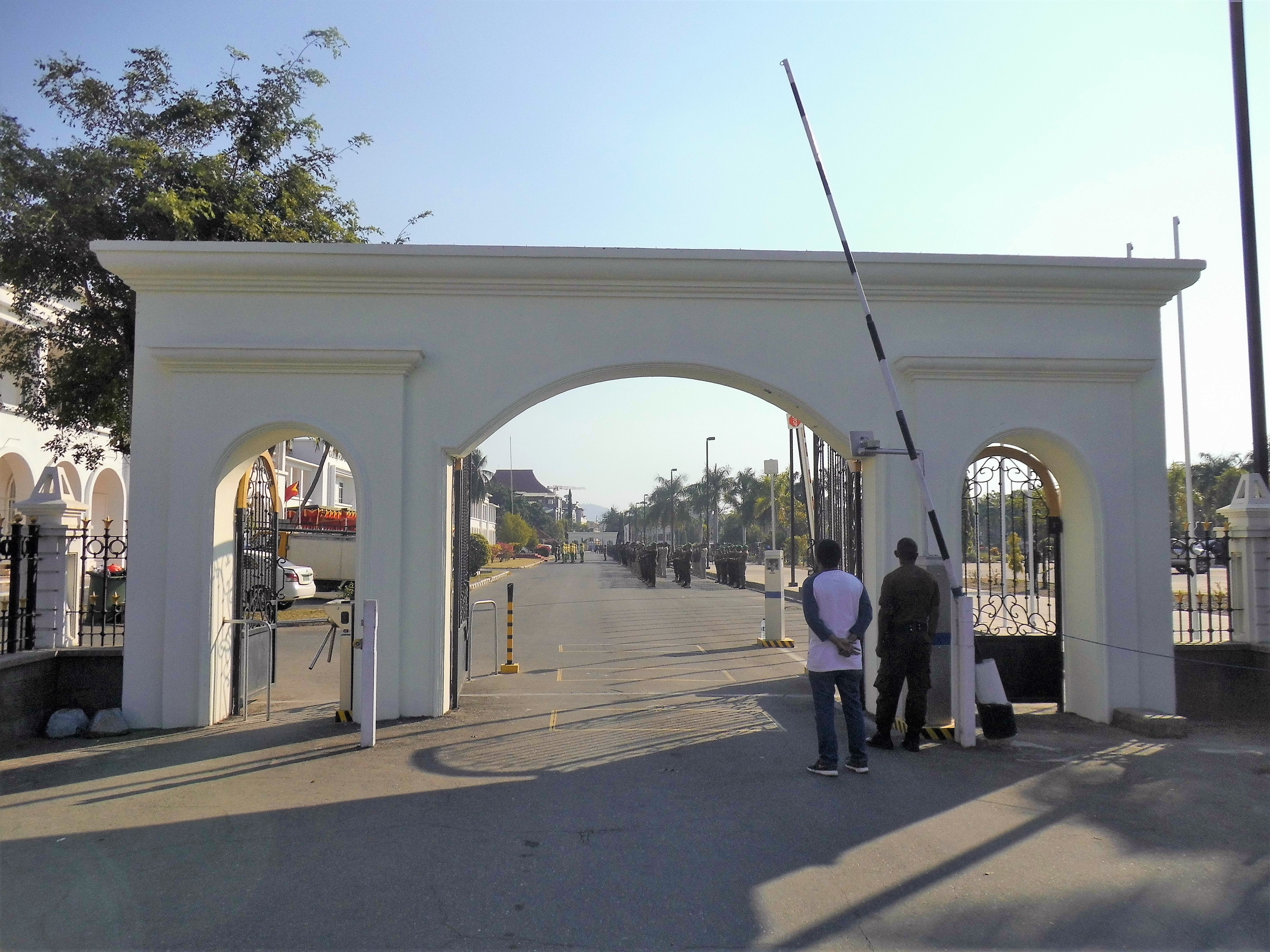 Eingang zum Regierungspalast